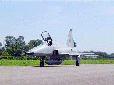 FORMACIÓN DE F-5 Y C-130 DE LA FUERZA AEREA DE HONDURAS